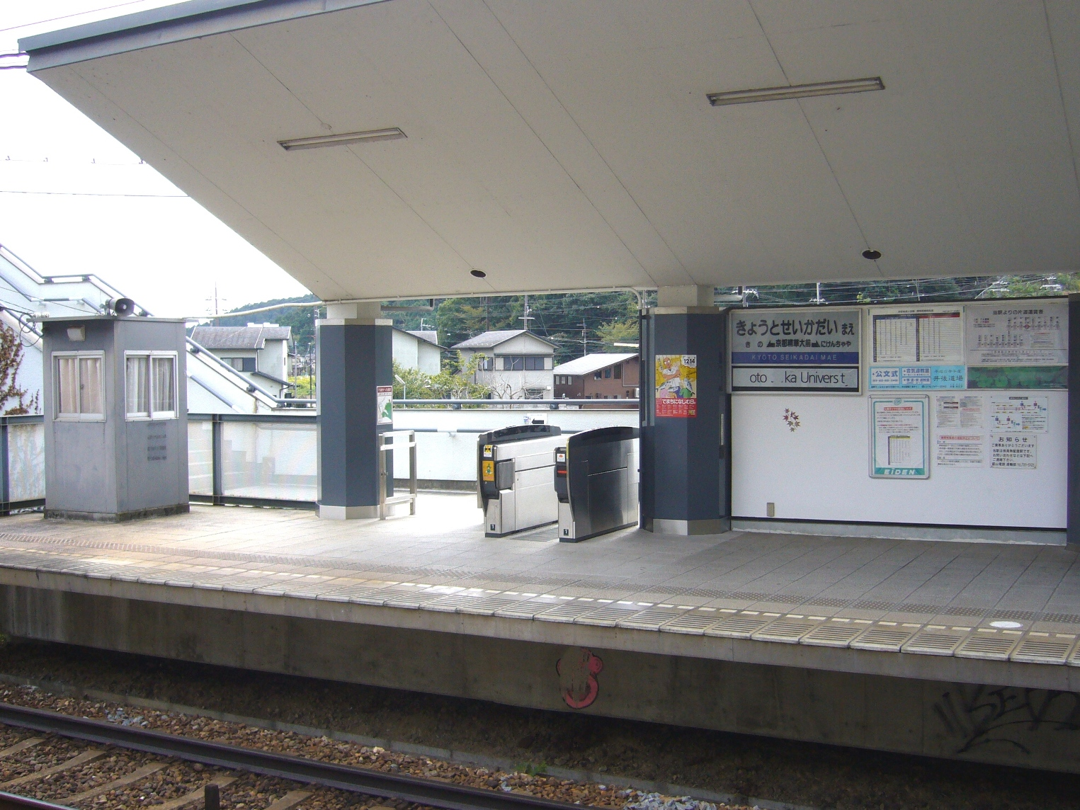 叡山電鉄鞍馬線京都精華大前駅の鞍馬駅方面行きホームの出入口。無人駅であるが自動改札機が1台設置されているのが見える。また、時期によって係員が配置できるよう係員詰所がある。出町柳駅行きホームから撮影。2007年10月13日に投稿者が撮影。